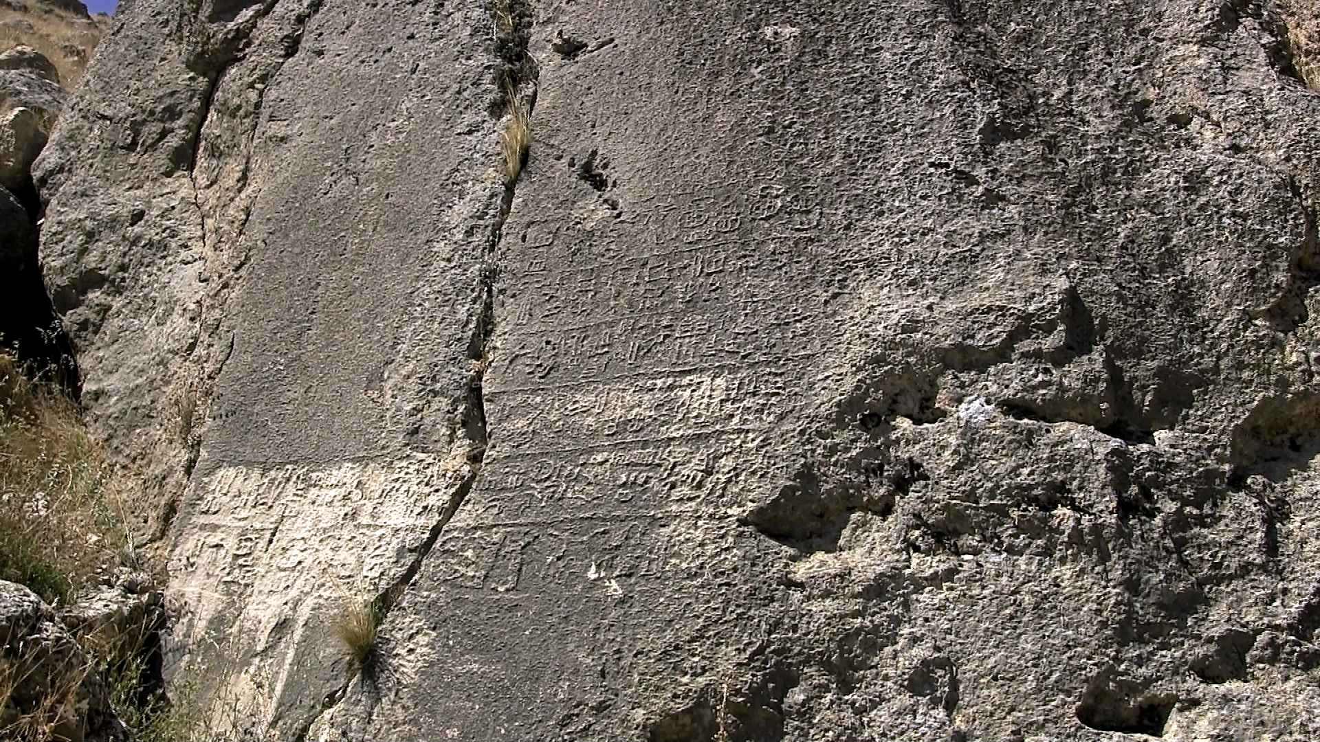 Luwische Felsinschriften von Gürün, Zentraltürkei, Obere Inschrift "Gürün B"